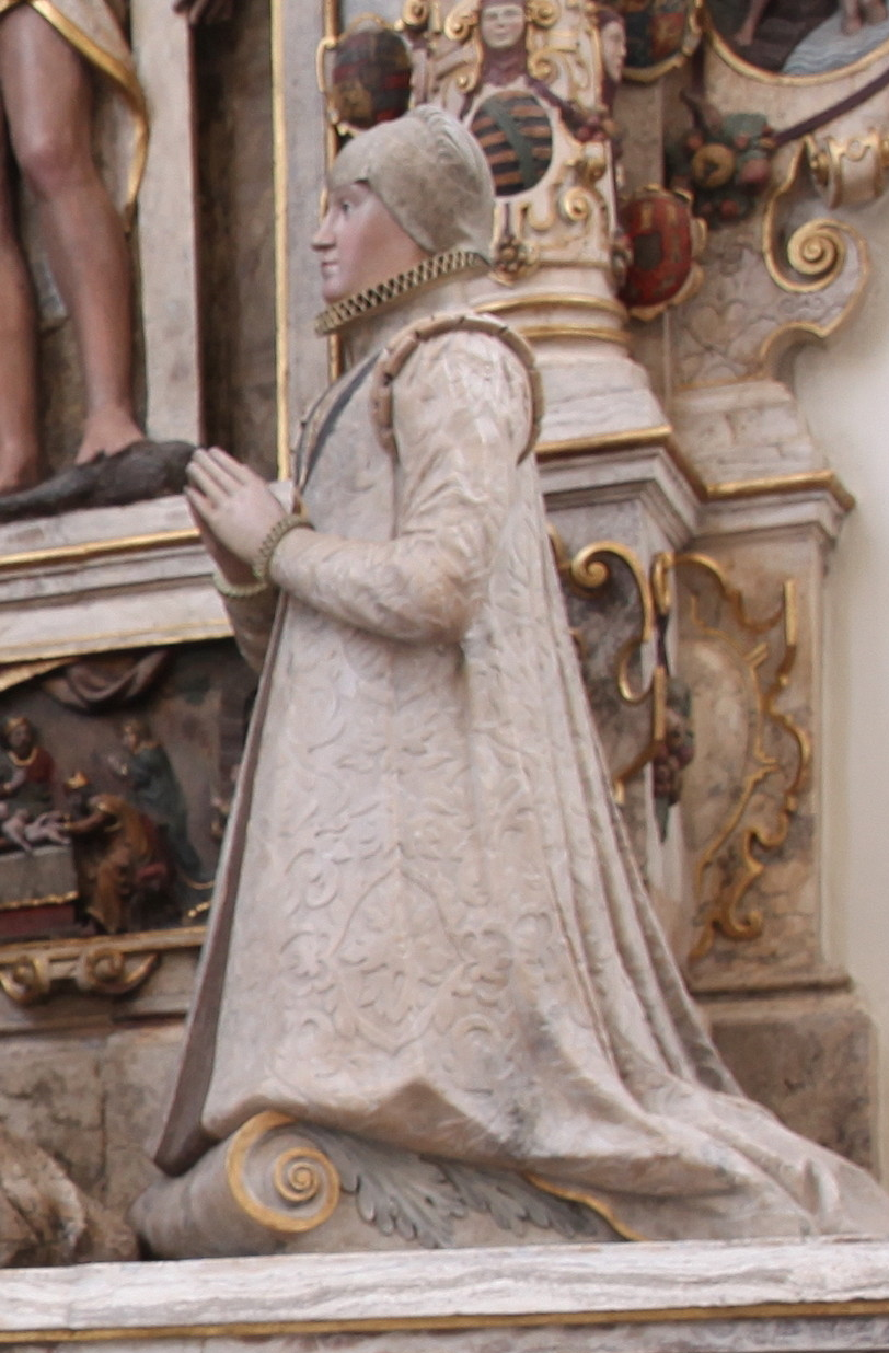 Coburg-Morizkirche-Alabaster-Epitaph, Elisabeth von der Pfalz (1540–1594)